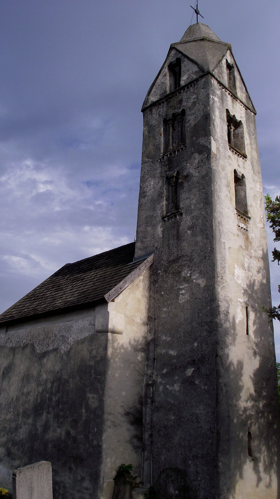 R. k. templom (Hévíz, EGREGY, Dombföldi u., temető) This is a photo of a monument in Hungary, Identifier: 10833